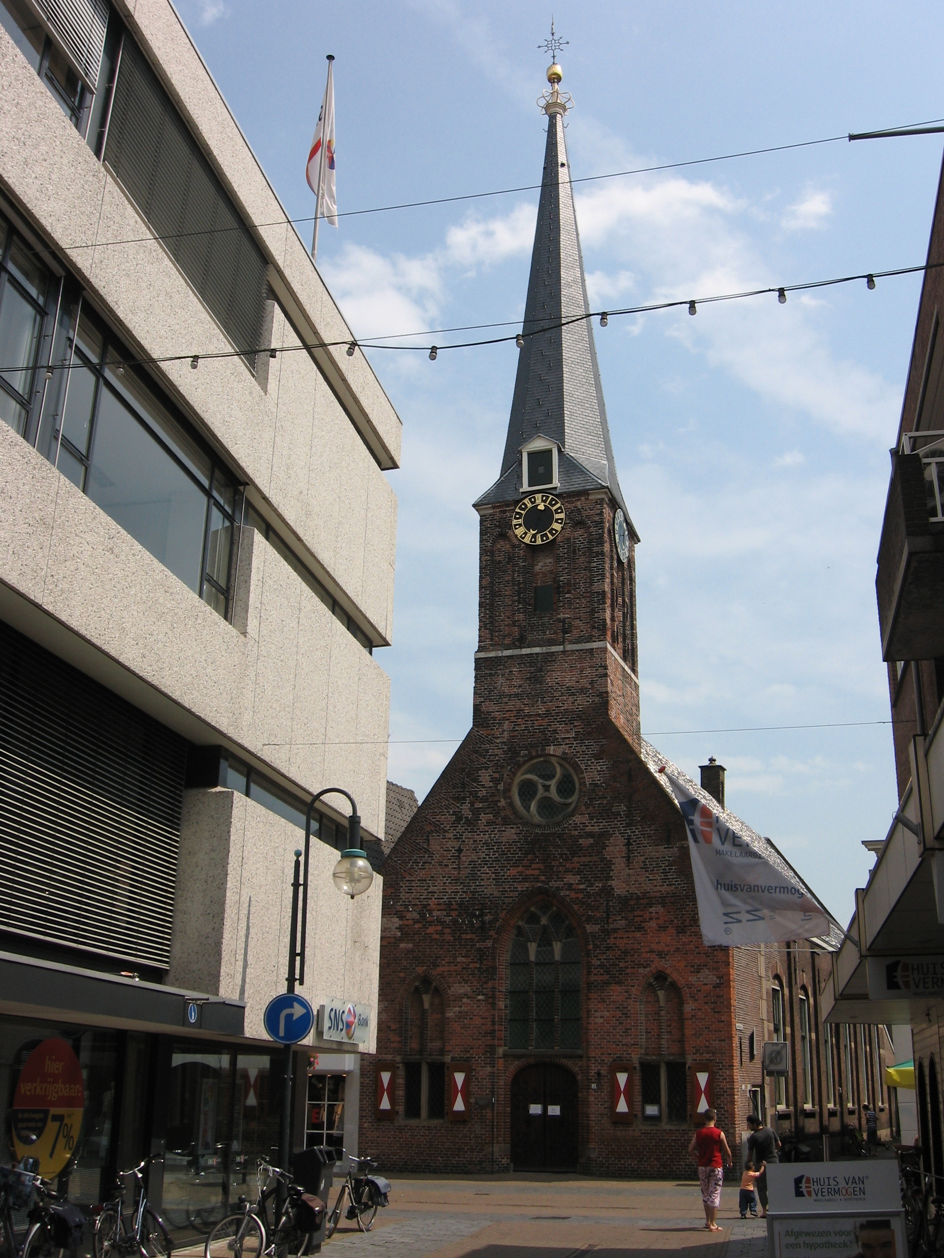 Zicht op de Heilige Geestkapel in de Arkelstraat in de binnenstad van Gorinchem